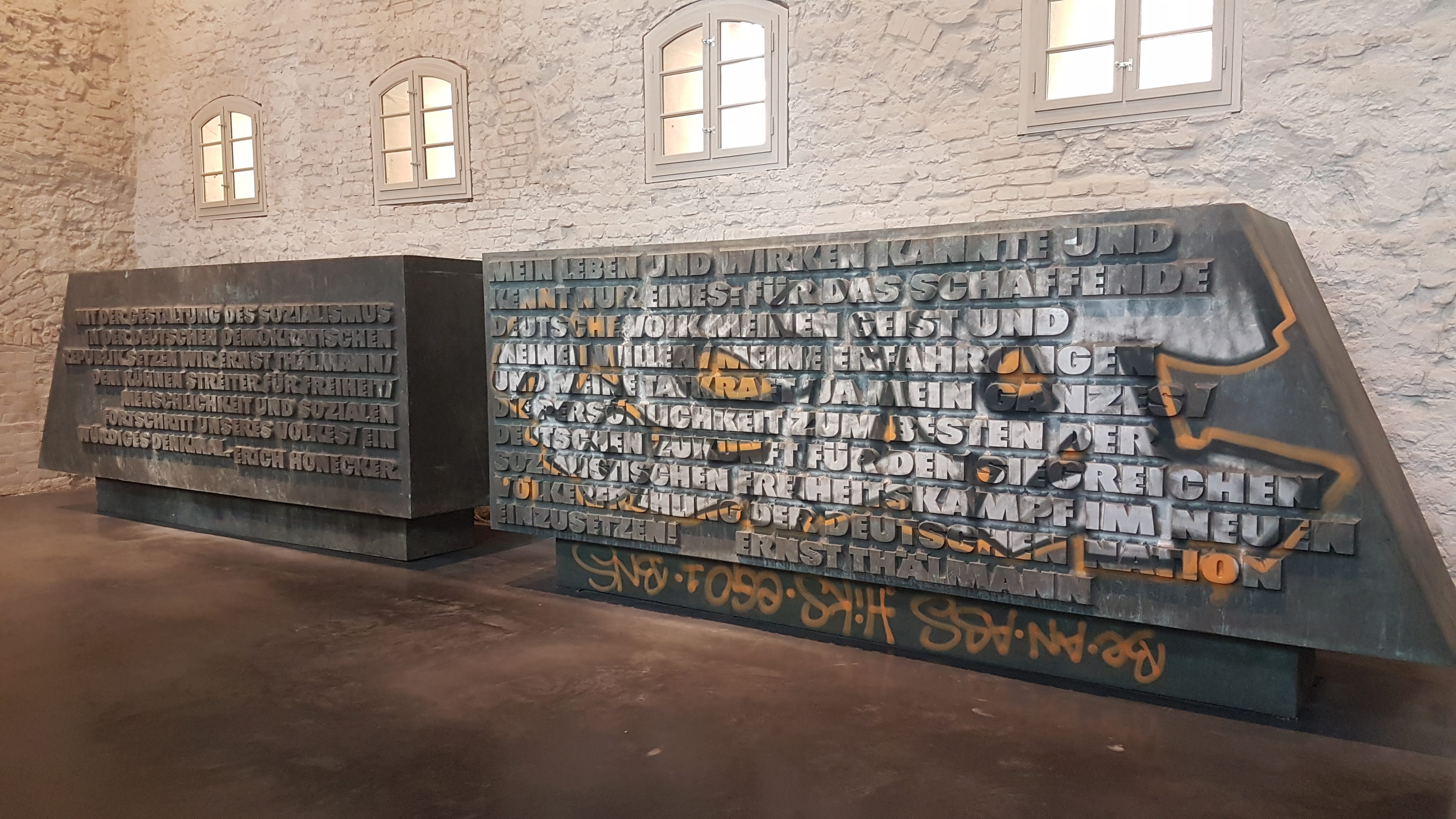 Die Schriftzüge des Ernst Thälmann Denkmals in der Zitadelle Spandau in der Dauerausstellung "Enthüllt. Berlin und seine Denkmäler". Aufschrift: MIT DER GESTALTUNG DES SOZIALISMUS IN DER DEUTSCHEN DEMOKRATISCHEN REPUBLIK SETZEN WIR ERNST THÄLMANN / DEM KÜHNEN STREITER FÜR FREIHEIT / MENSCHLICHKEIT UND SOZIALEN FORTSCHRITT UNSERES VOLKES / EIN WÜRDIGES DENKMAL. ERICH HONECKER MEIN LEBEN UND WIRKEN KANNTE UND KENNT NUR EINES: FÜR DAS SCHAFFENDE DEUTSCHE VOLK MEINEN GEIST UND MEINEN WILLEN / NEUBE ERFAHRUNGEN UND MEINE TATKRAFT / JA MEIN GANZES / DIE PERSÖNLICHKEIT ZUM BESTEN DER DEUTSCHEN ZUKUNFT FÜR DEN SIEGREICHEN SOZIALISTISCHEN FREIHEITSKAMPF IM NEUEN VÖLKERFRÜHLING DER DEUTSCHEN NATION EINZUSETZEN! ERNST THÄLMANNThis is a photograph of an architectural monument.